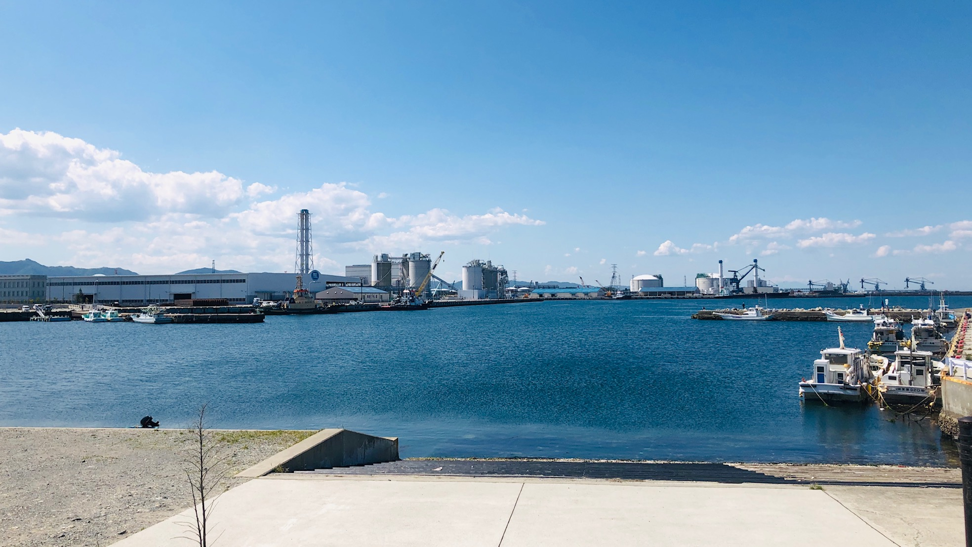 相馬港・相馬共同火力新地発電所を撮影した画像。